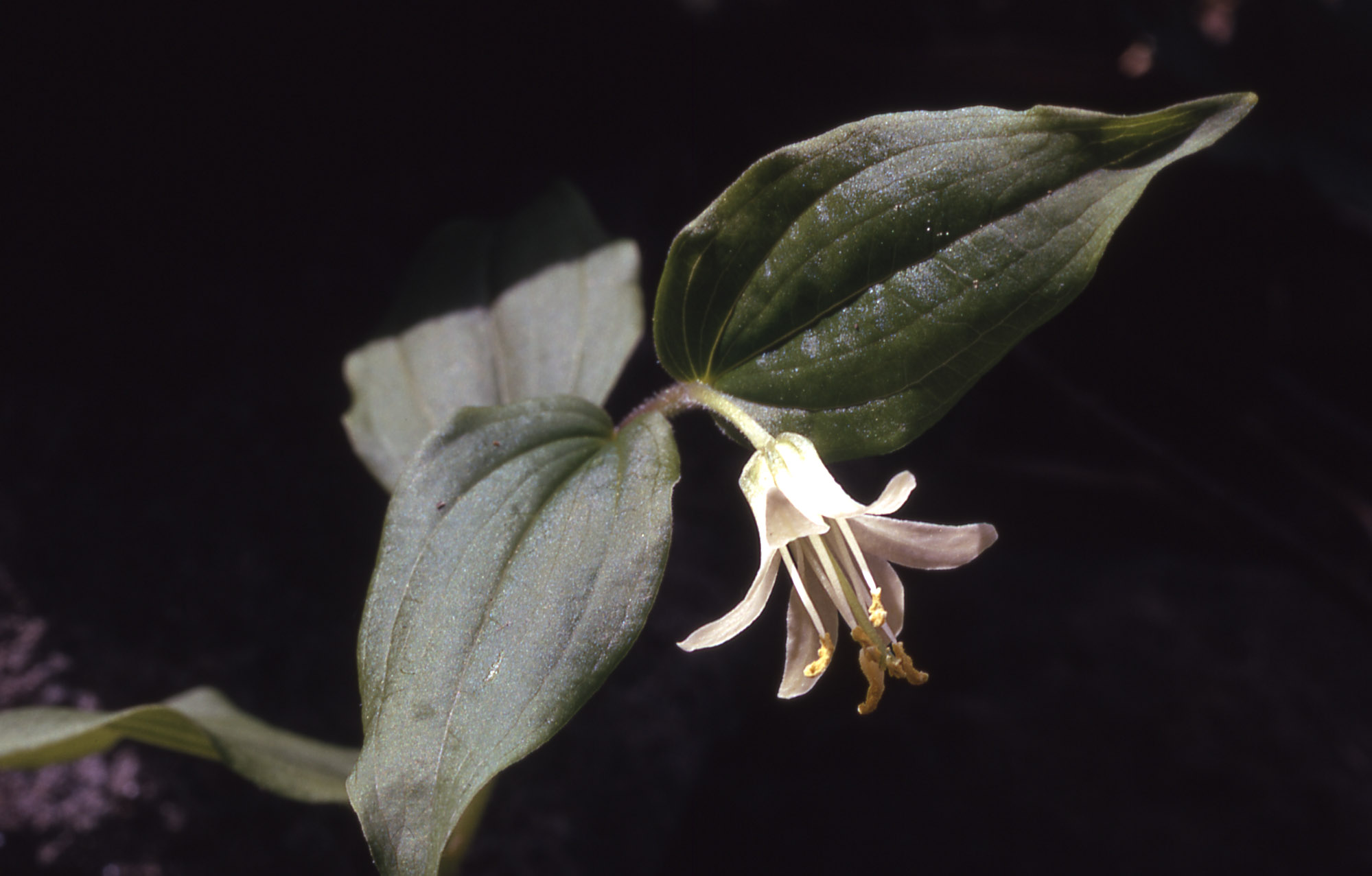 Prosartes trachycarpa